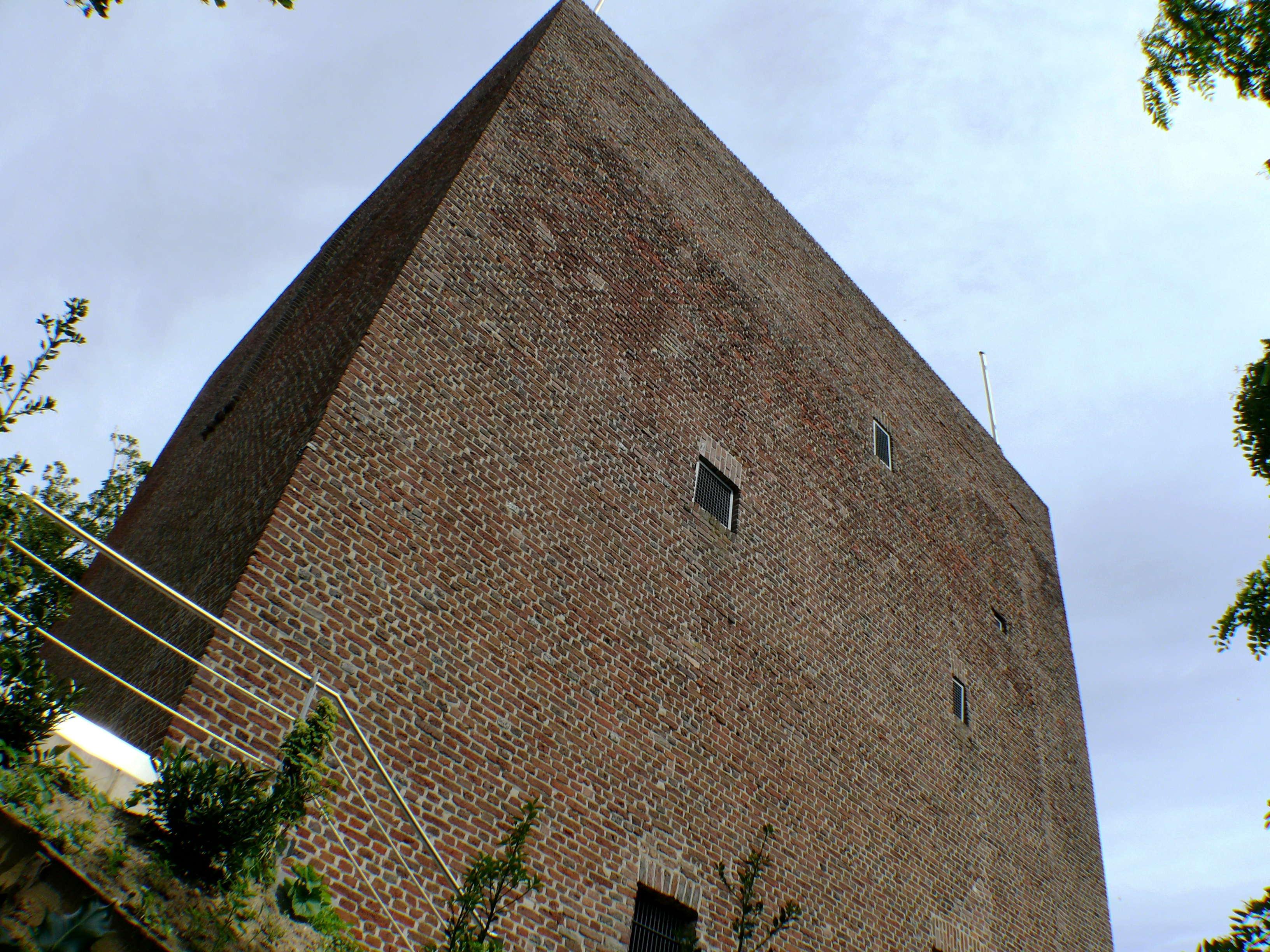 Wassenberg , Deutschland (wieża)